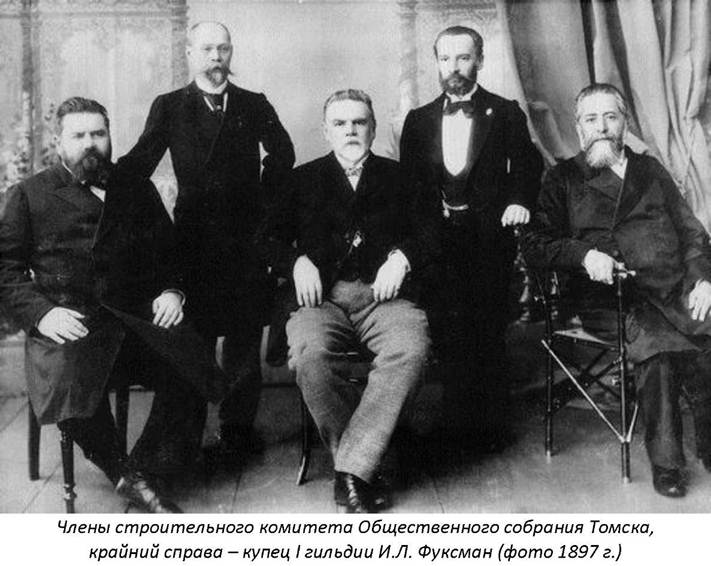 Члены строительного комитета по возведению здания Общественного собрания. Слева направо: Алексей Евграфович Кухтерин, Николай Яковлевич Беляев, Николай Павлович Меженинов, Константин Константинович Лыгин, Илья Леонтьевич Фуксман